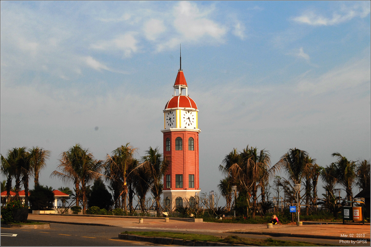 观海台钟楼